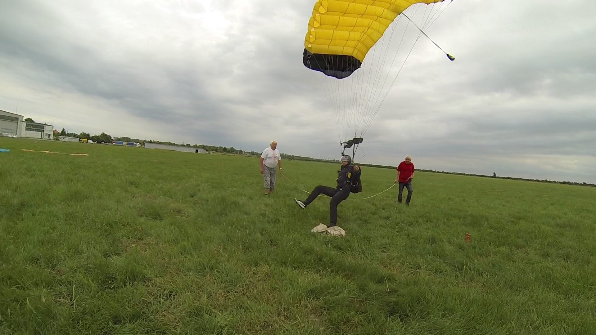 Spadochronowe Mistrzostwa Śląska 2016, Paweł Mostowski ląduje w „centro“ - Sekcja Spadochronowa Aeroklubu Gliwickiego